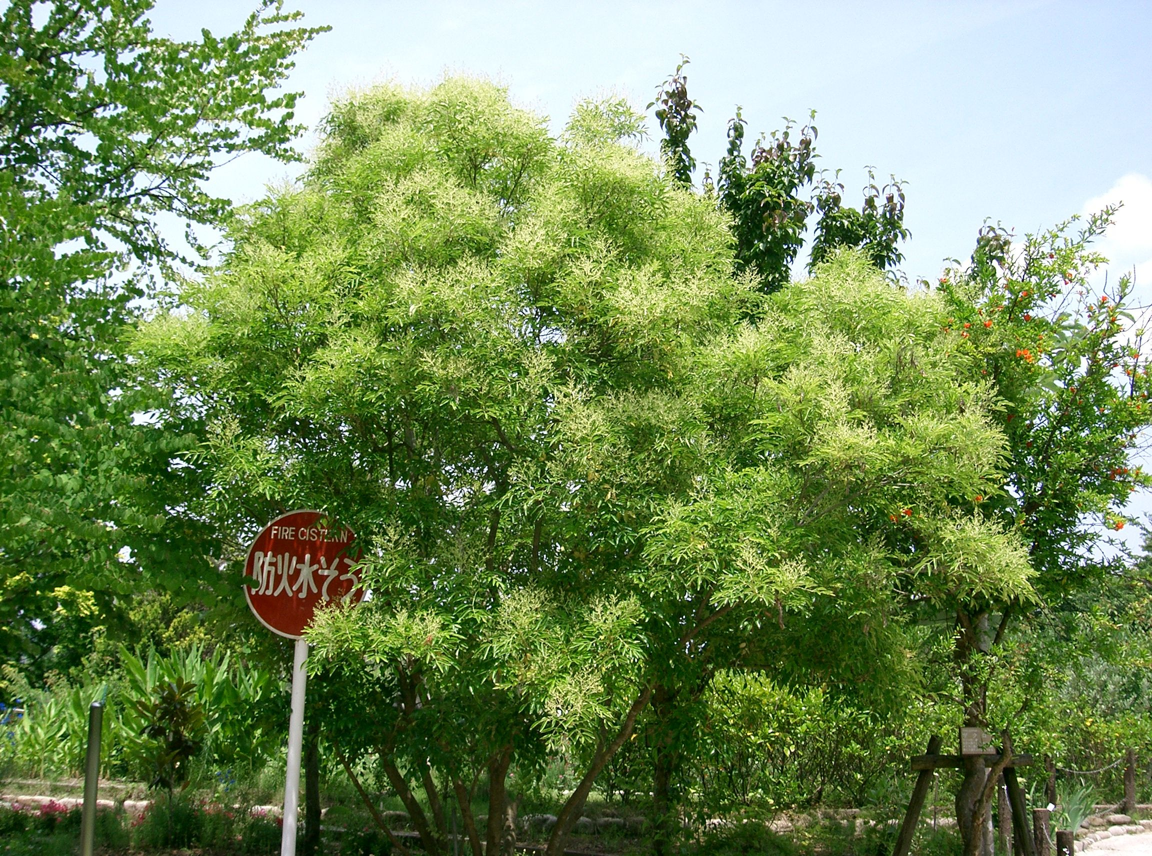 Fraxinus japonica